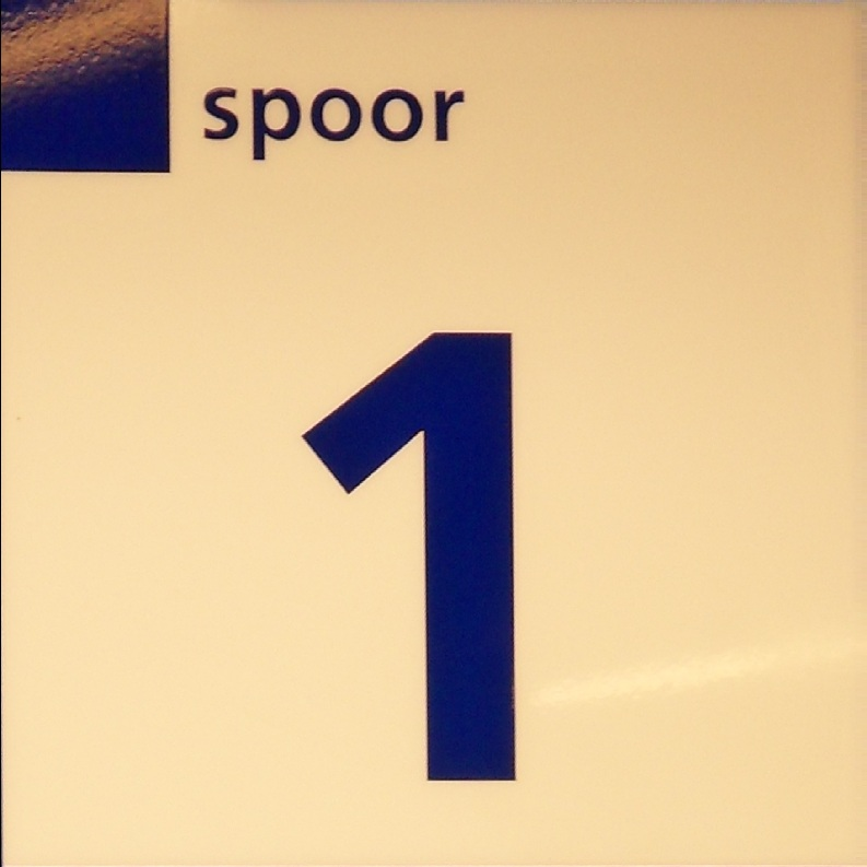 De aanduiding van een spoor. Station Driebergen-Zeist.